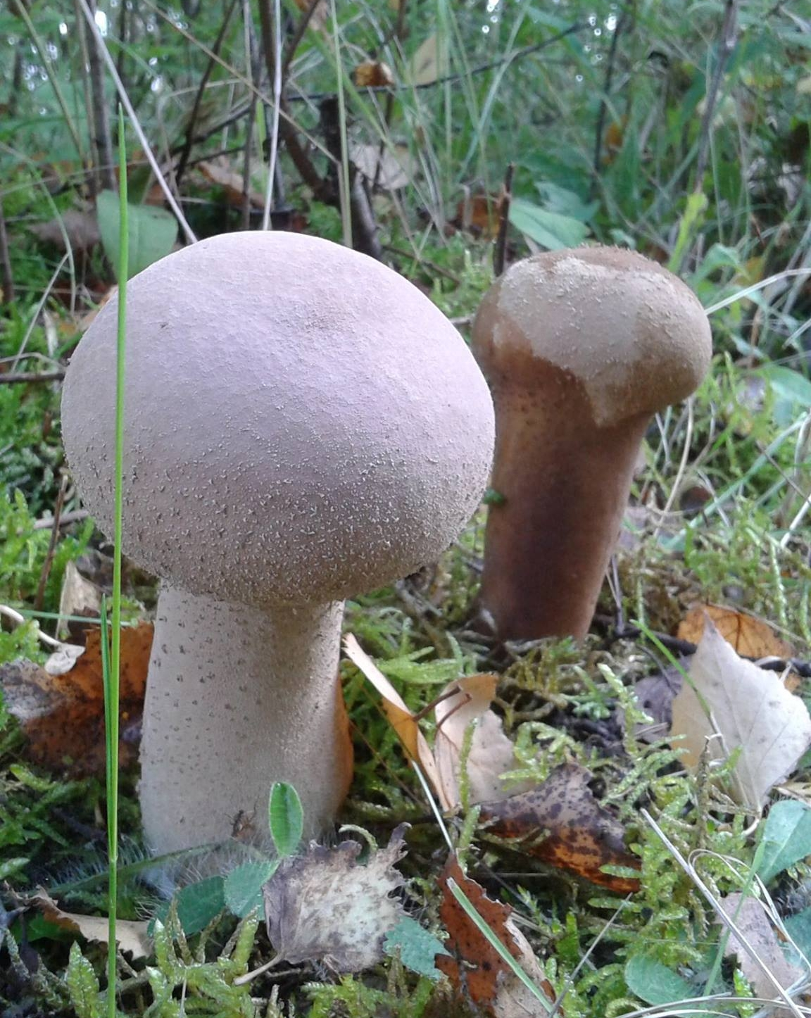 photographie prise dans le nord pas de calais, en octobre 2015